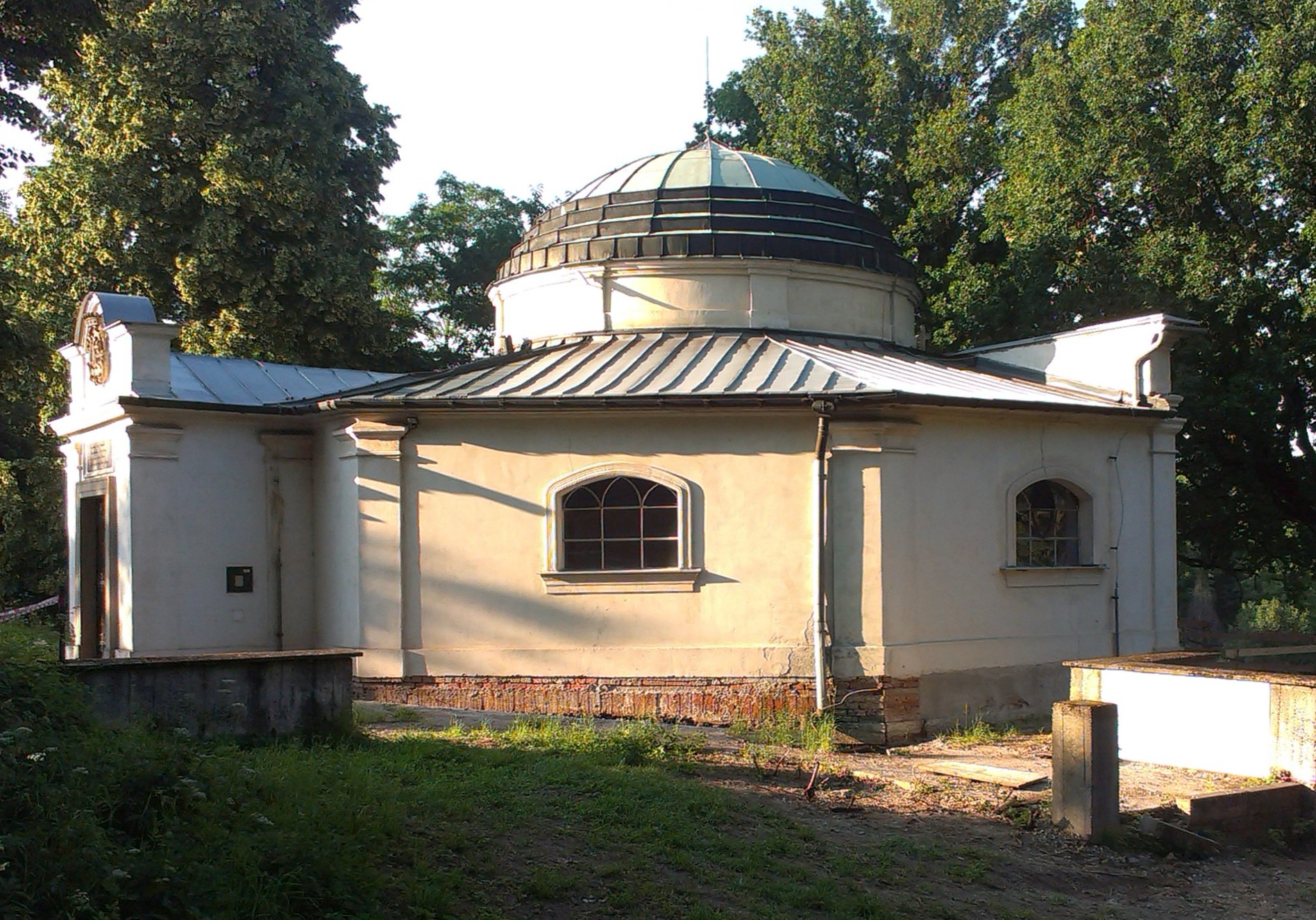 Hrobka Marie Ebner-Eschenbachové s bustou, Zdislavice (Troubky-Zdislavice).